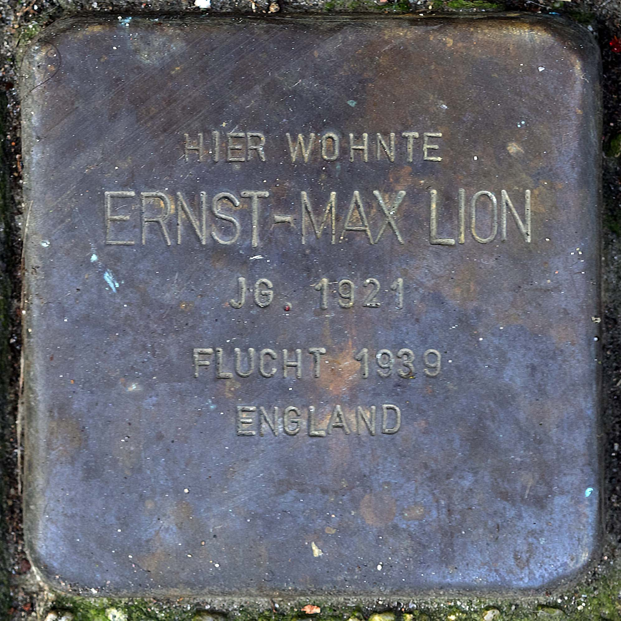 Stolperstein für Lion Ernst-Max